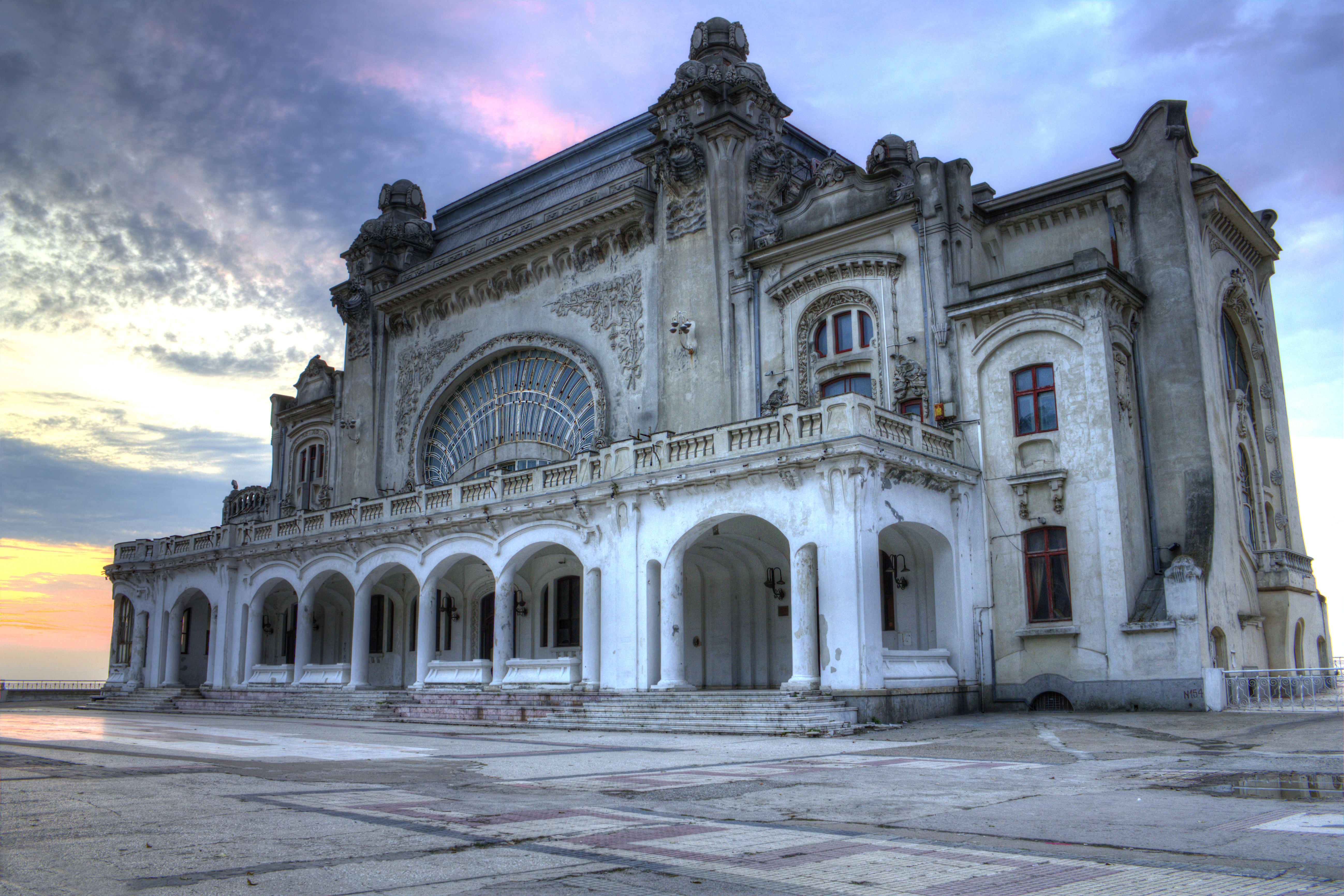 Fotografie realizata prin procedeul HDR (High Dynamic Range) din 3 cadre cu expunere diferita.